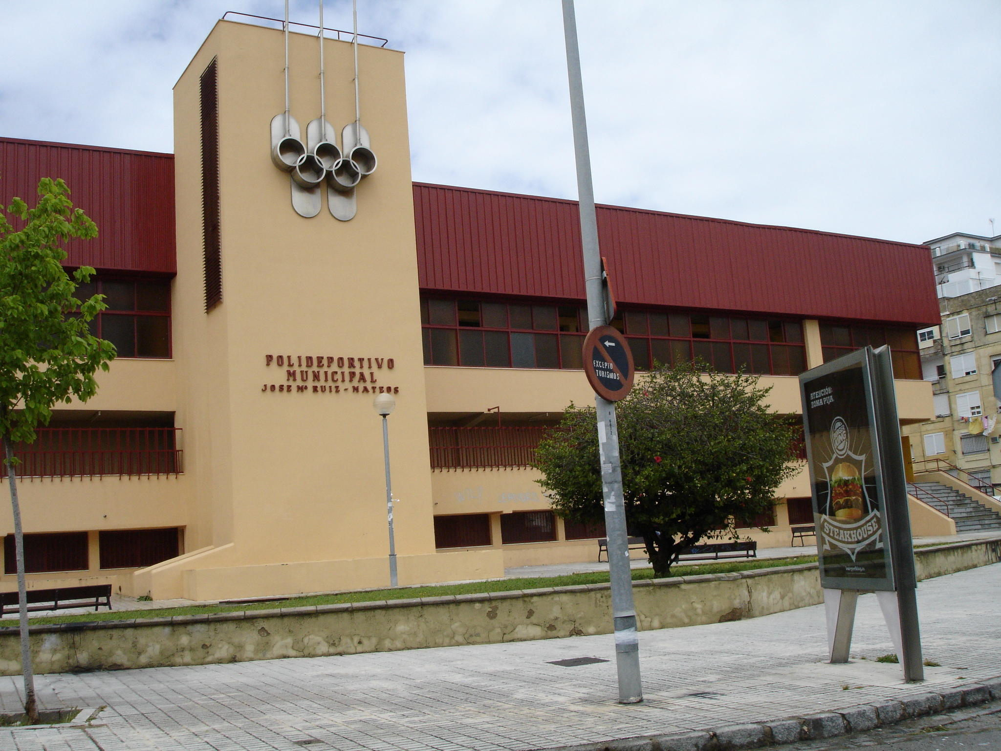 Pabellón Ruíz Mateos, Jerez (Spain)